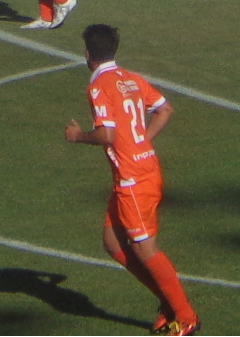 Maximiliano Gálvez en 2016